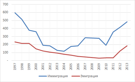 Иммиграция и эммиграция в России в 1997-2013 годах. Источник: Страница